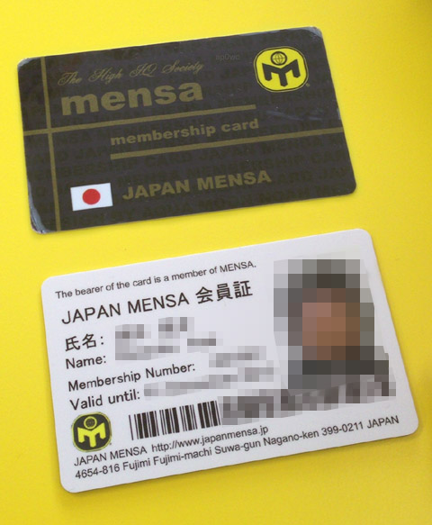 japan mensa 会員証